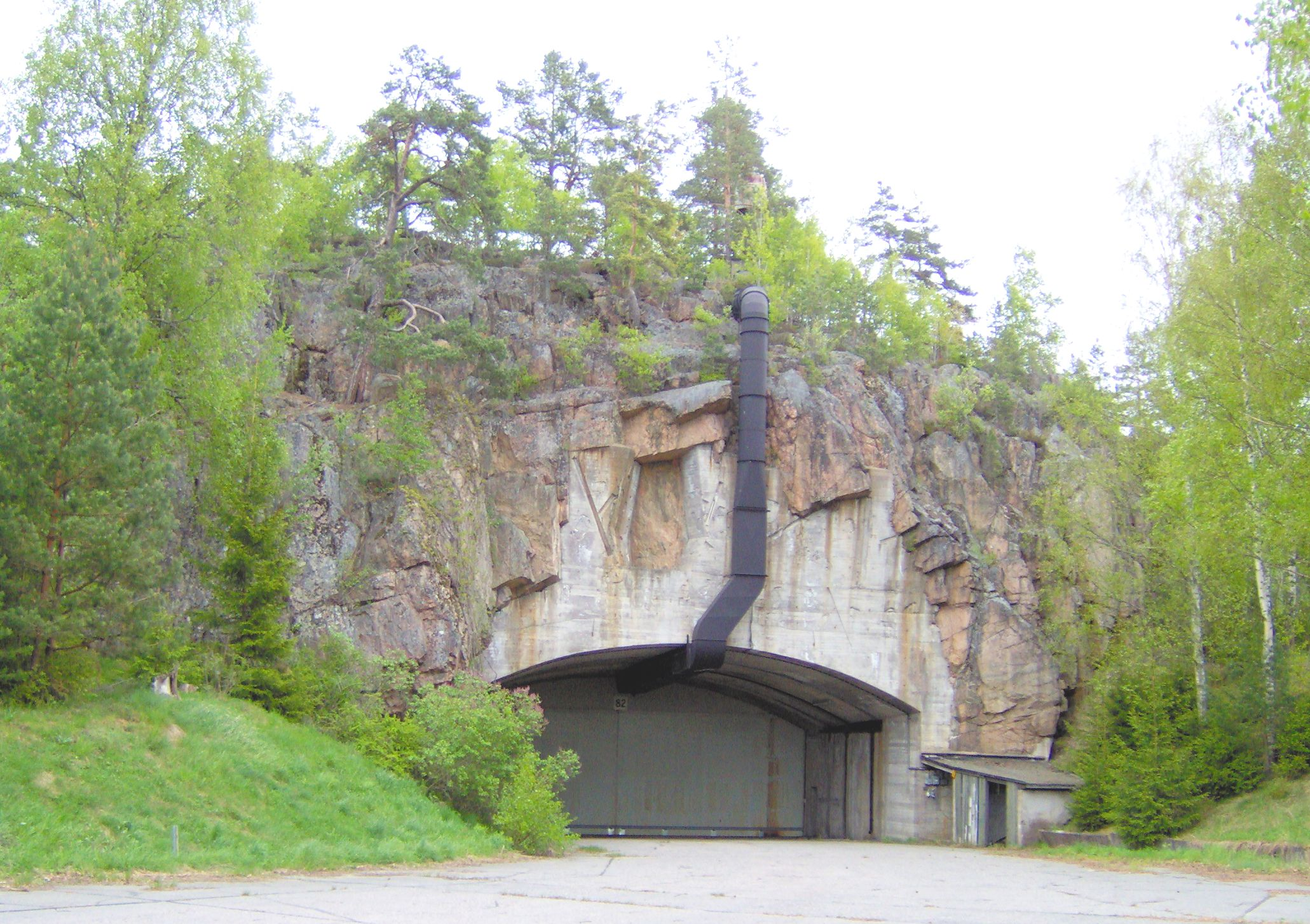 Bergshangar F 18, År 2006